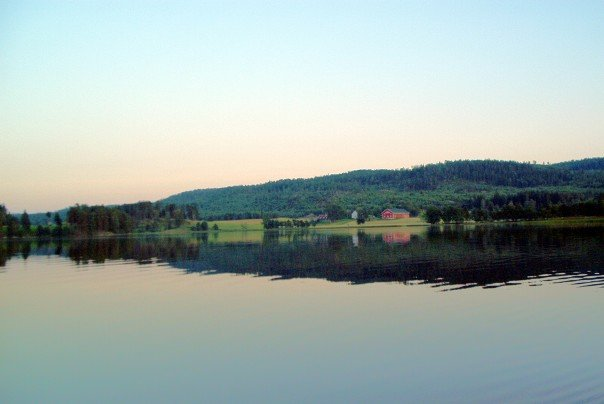 Øgderen (Hemnessjøen)